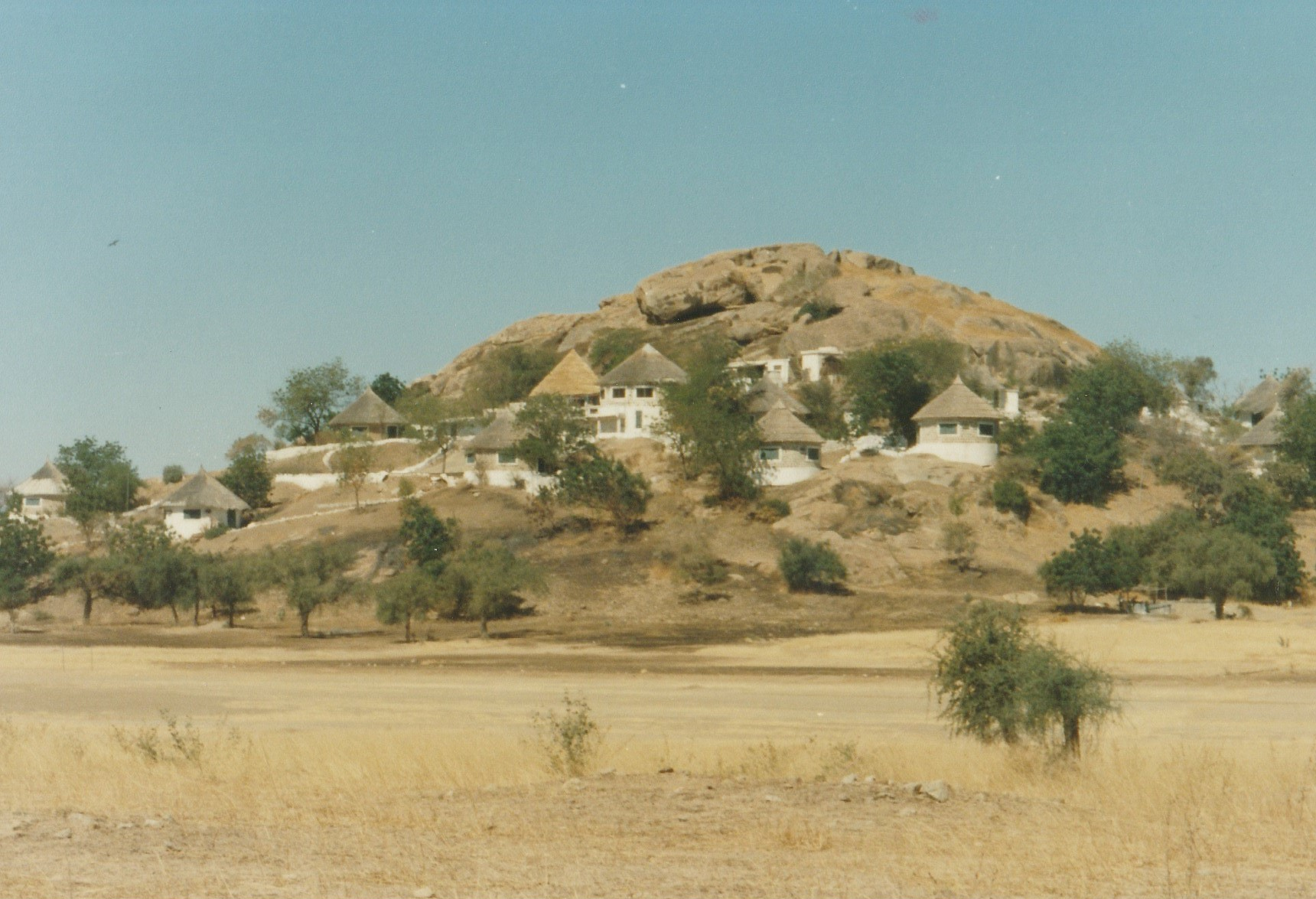 village, Extrème-nord, Cameroun